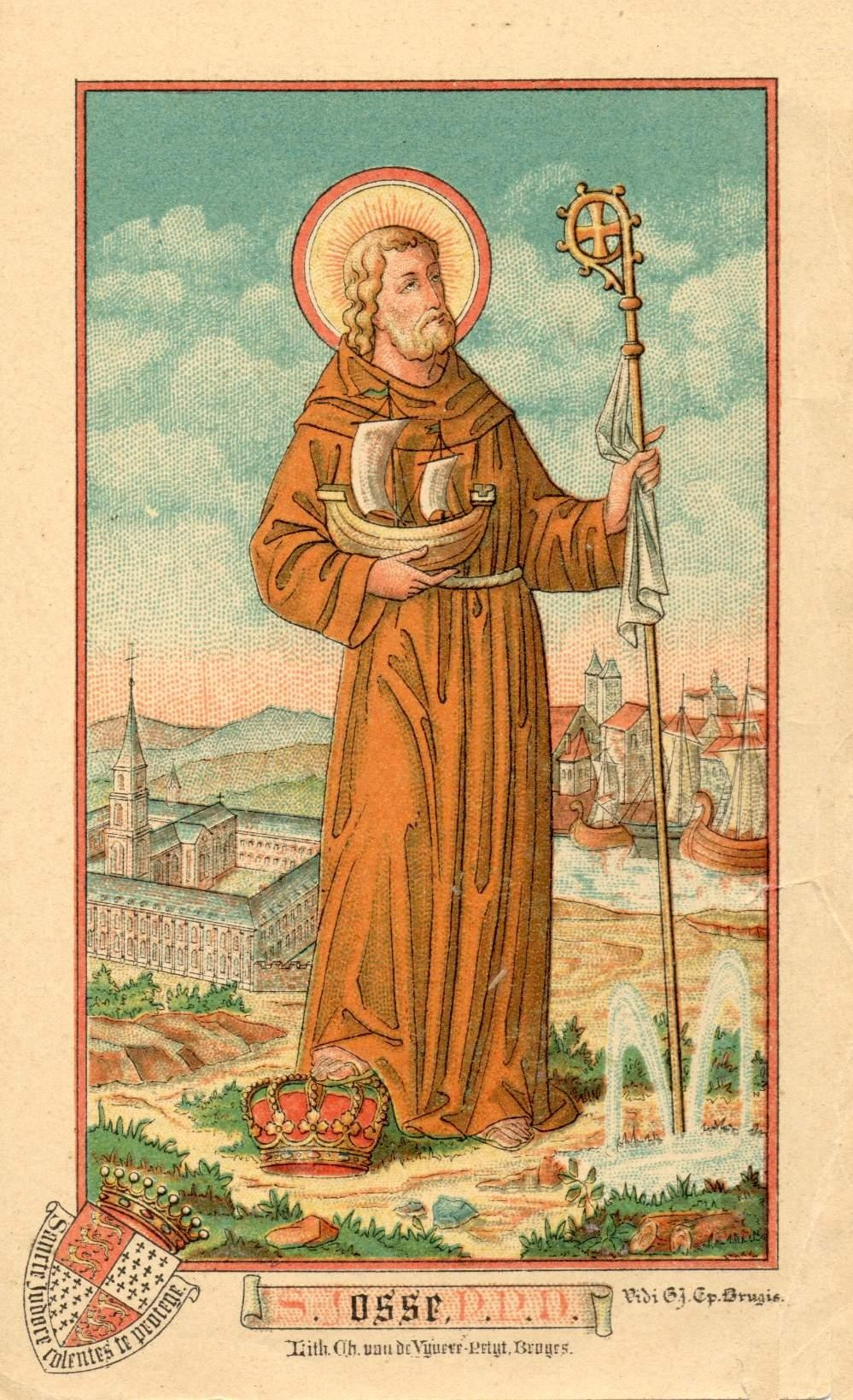 Saint Josse, image pieuse imprimée à Bruges chez Lithographie-Typographie Van de Vyvere-Petyt (Belgique)